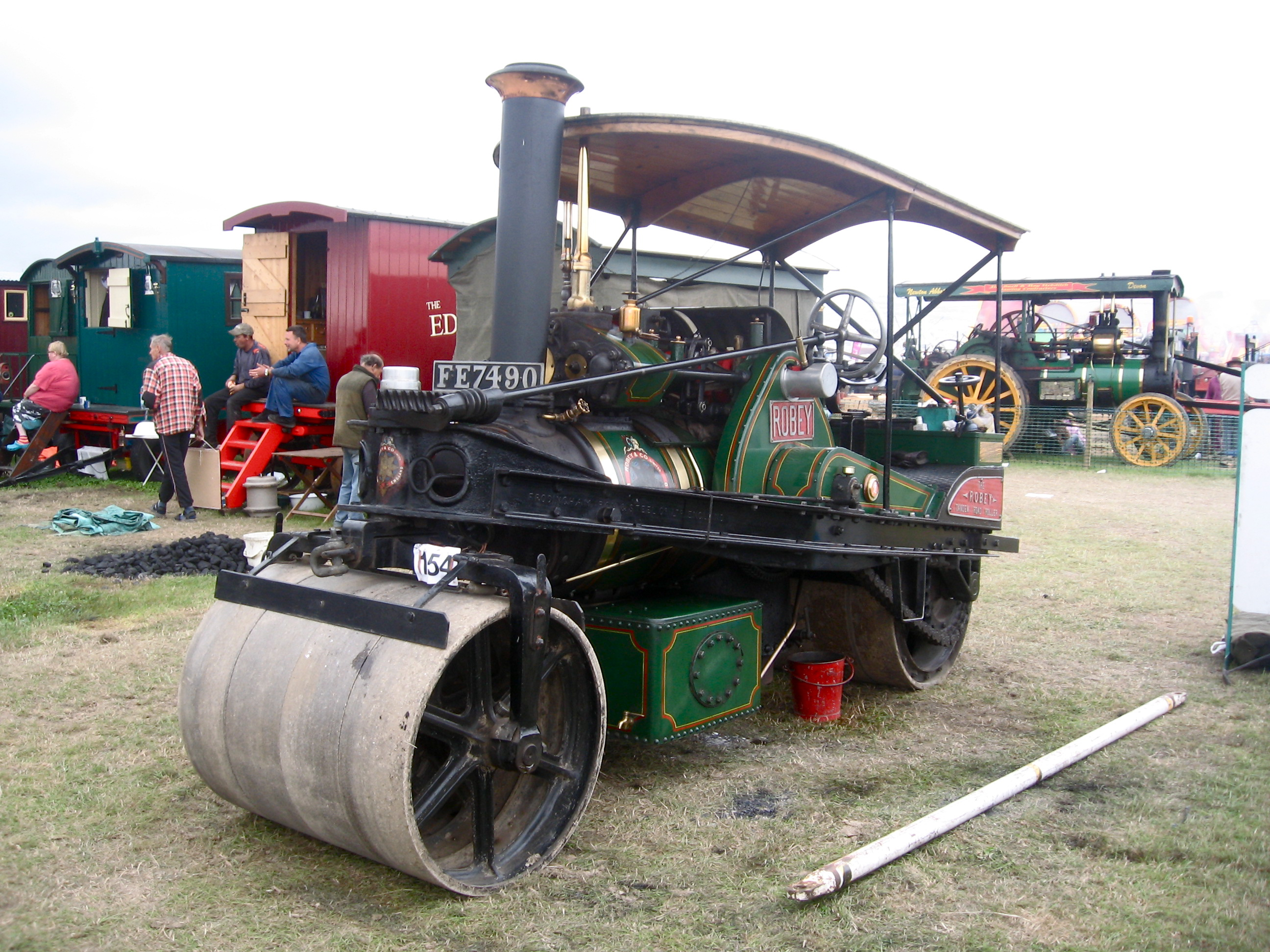 Uberness.